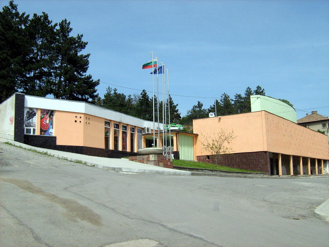 Летният театър на град Попово - април 2008 год. Фото: Вл. Стойков